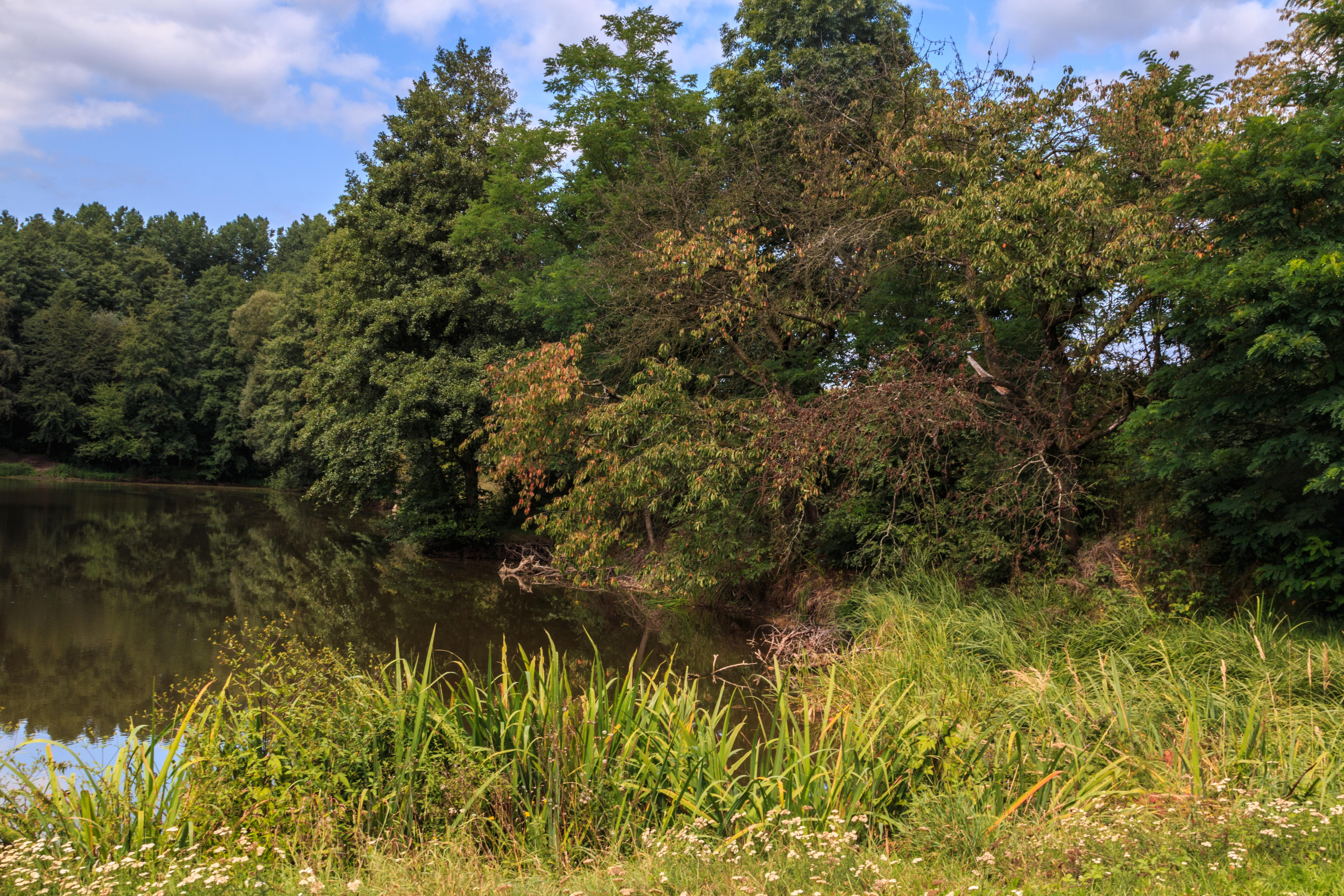 Rybník Týnišťko